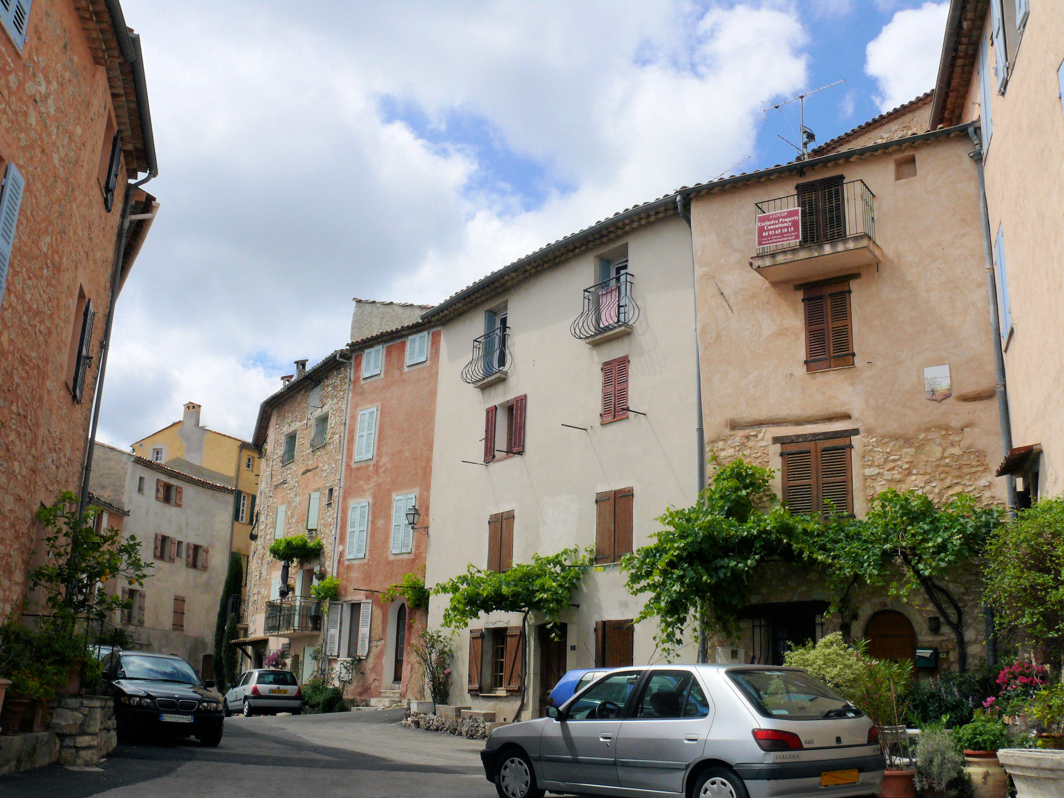 Châteauneuf-Grasse - Place de la Vieille-Mairie